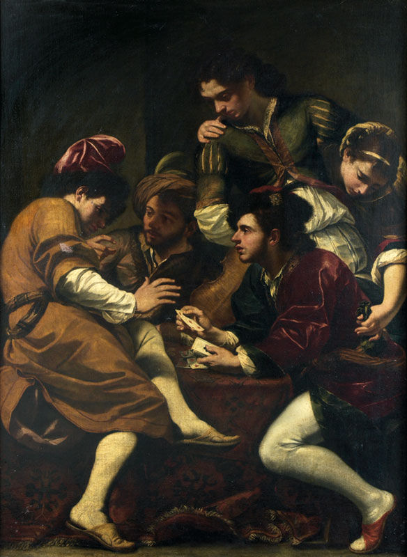 La parabola del hijo pródigo o los jugadores de cartaslabel QS:Les,"La parabola del hijo pródigo o los jugadores de cartas"